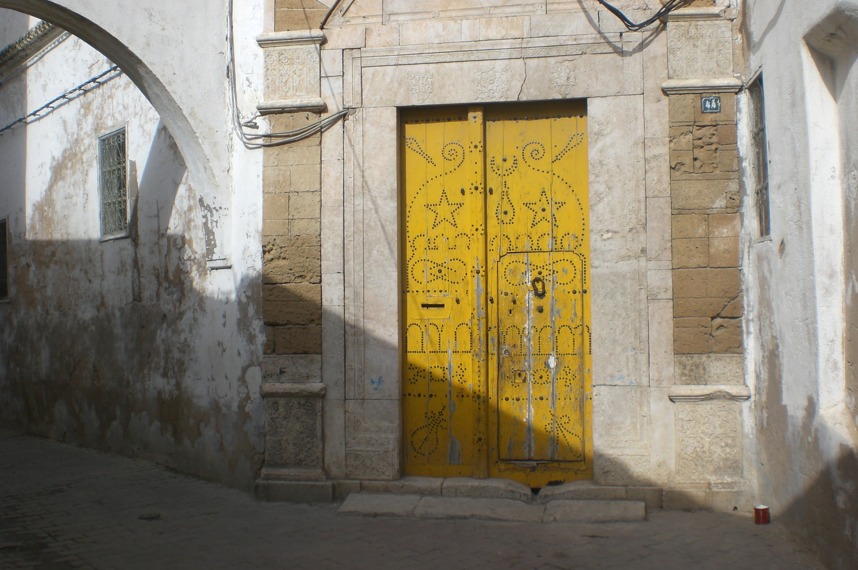 Medersa Husseinia Kobra-Tunis